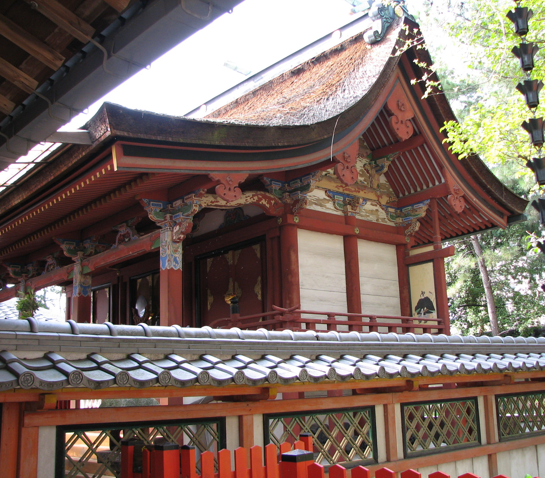 Katano Shrine Honden, Hirakata, Osaka, Japan 片埜神社本殿（大阪府枚方市）